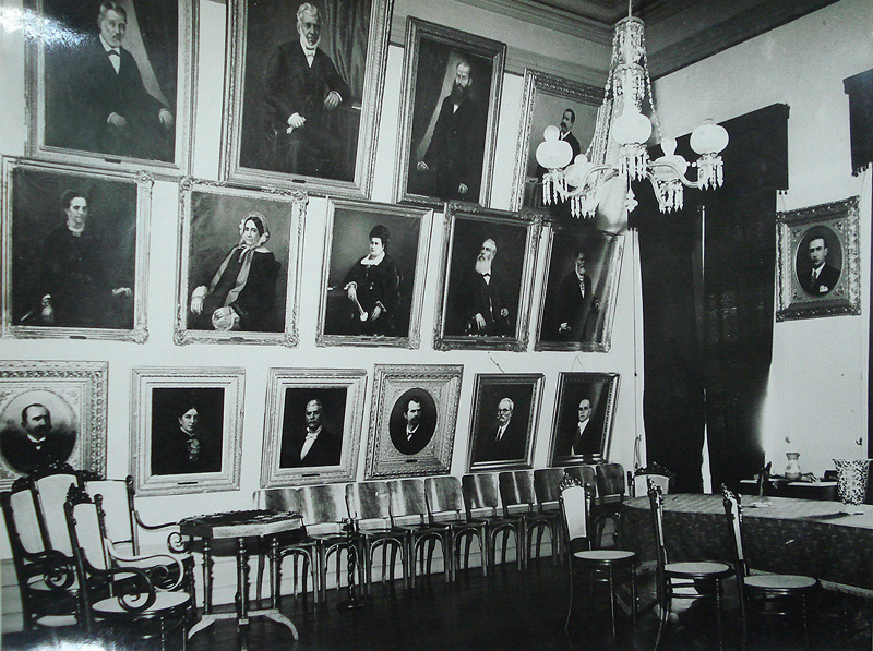 Antigo Salão Nobre da Beneficência Portuguesa de Porto Alegre, Brasil. Imagem de autor e data desconhecidos, cedida para reprodução na Wiki pelo Arquivo da Beneficência